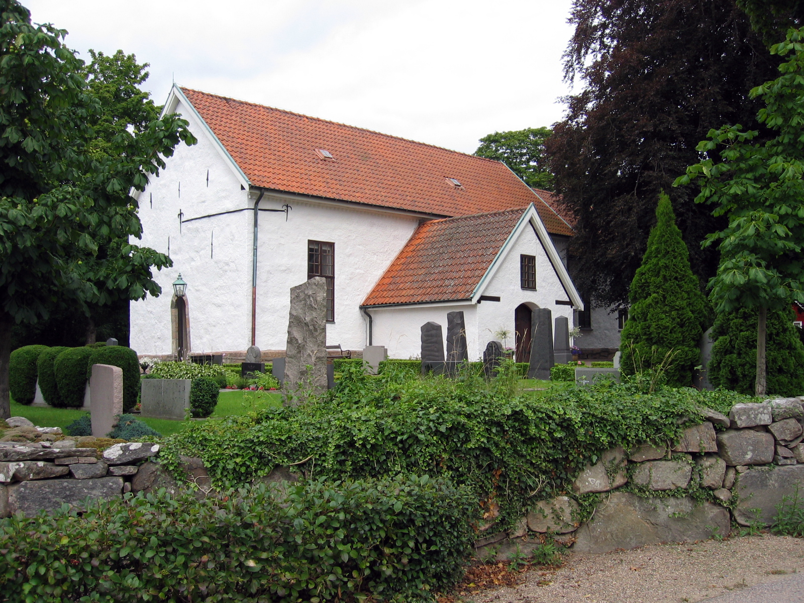 Foto: Fantomen